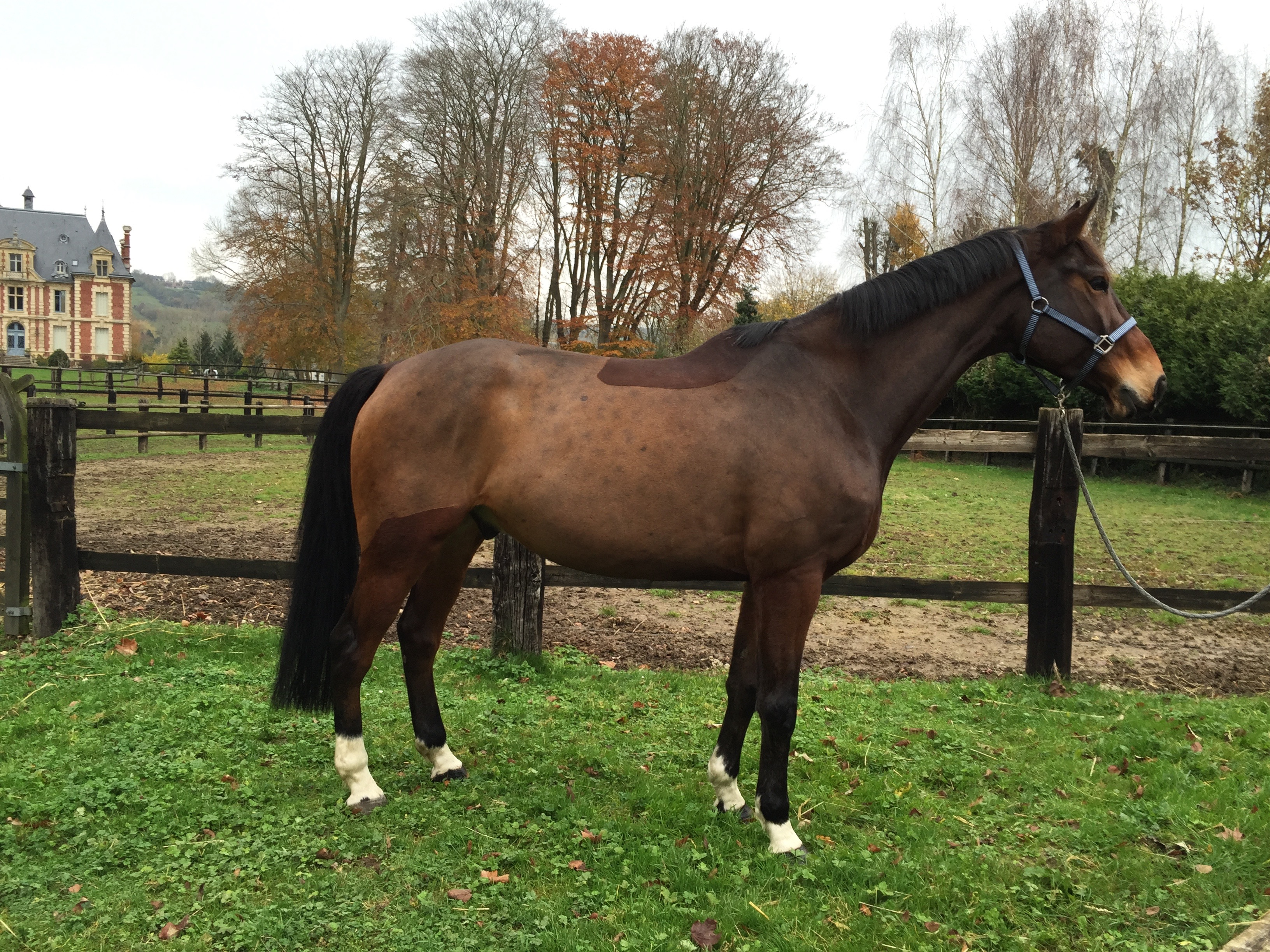 Roinito del Bosco, selle français